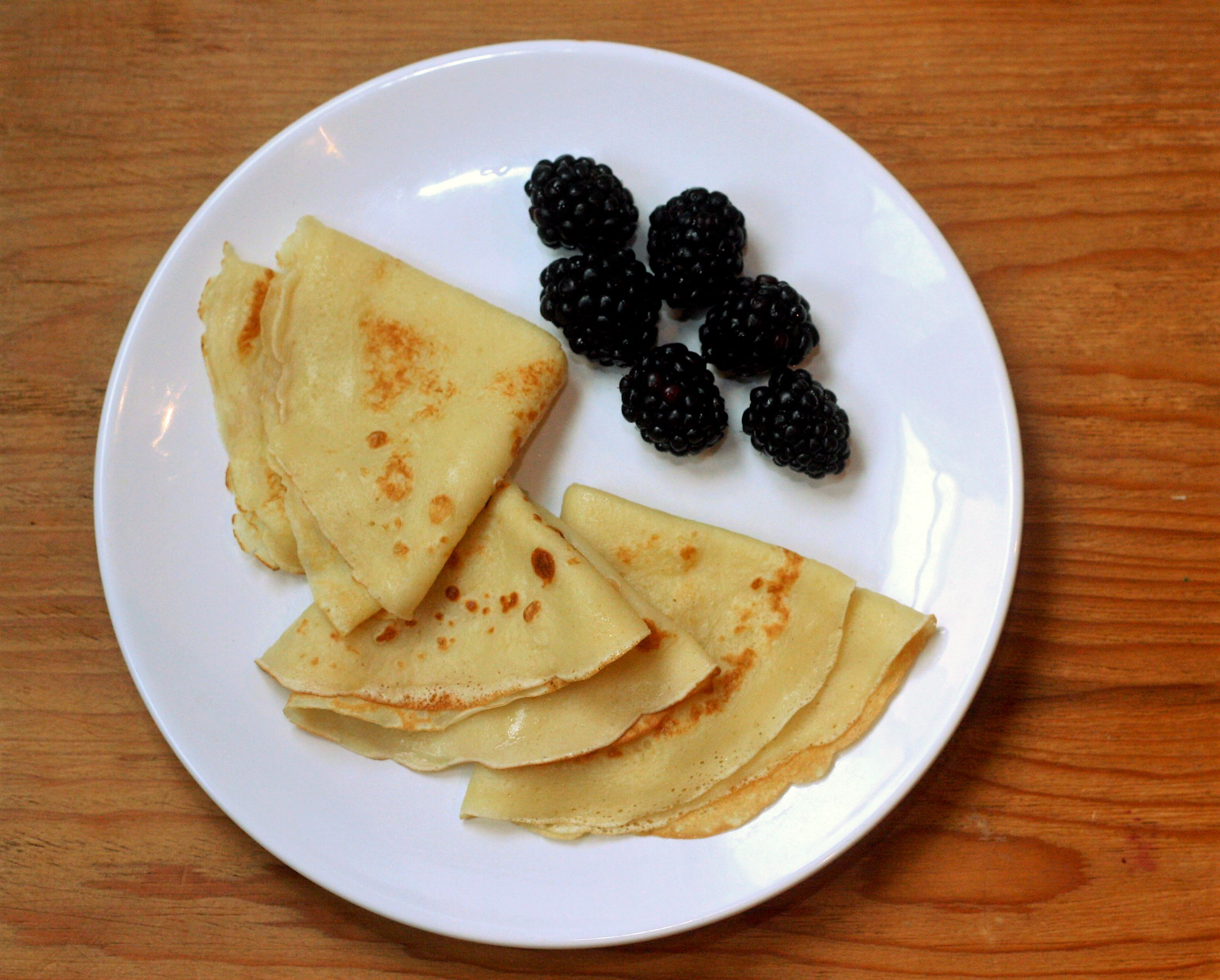 Drei frisch zubereitete, gefaltete Crêpes auf einem Essteller; mit frischen Früchten (Brombeeren).